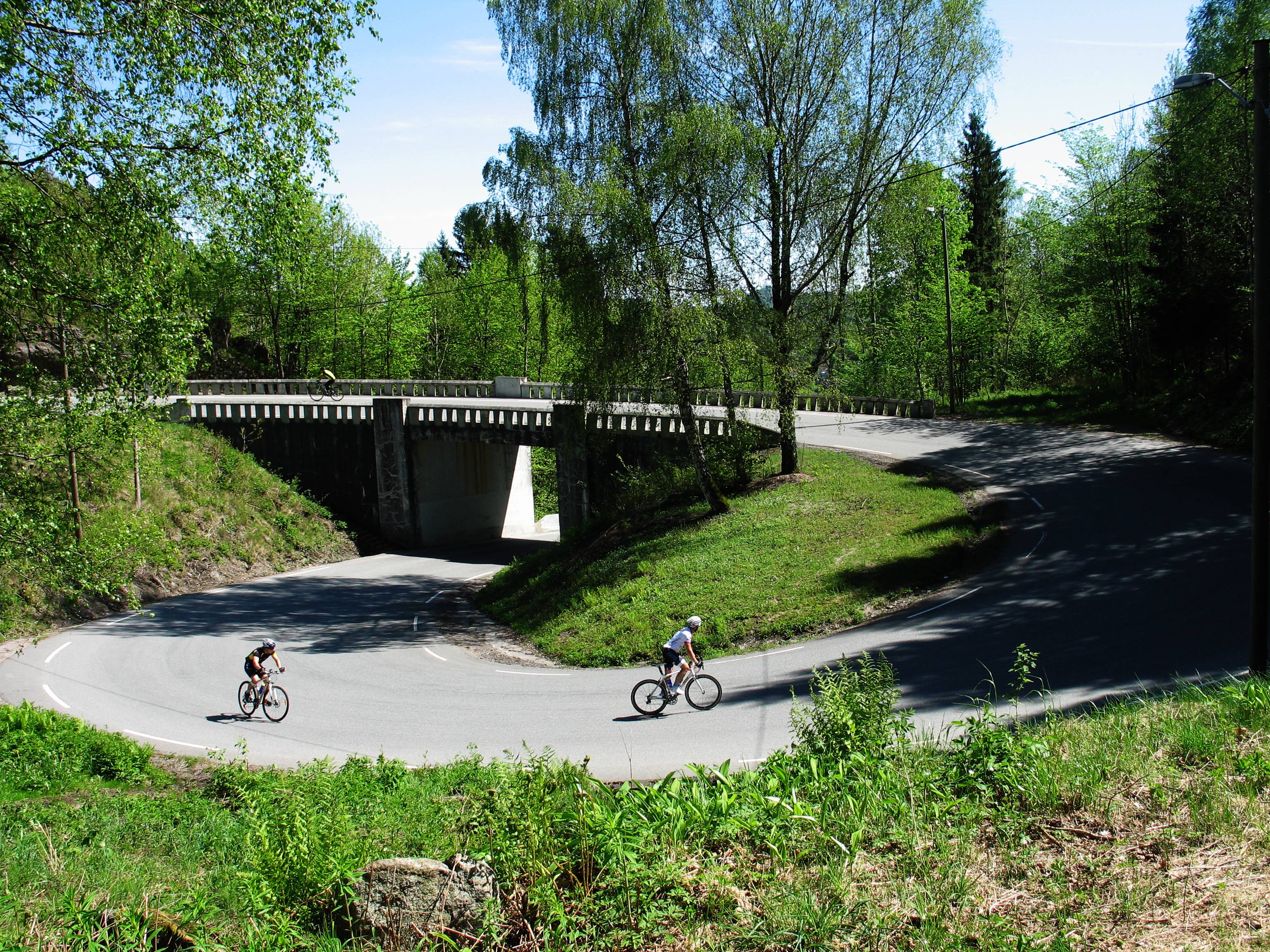 Fredet vei i Langangen, Porsgrunn kommune i Telemark